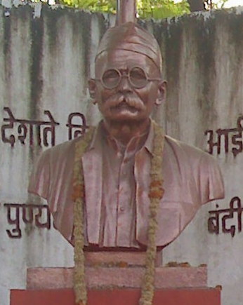 Statue of Senapati Bapat